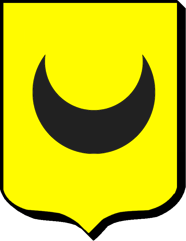 D'or au croissant de sable.